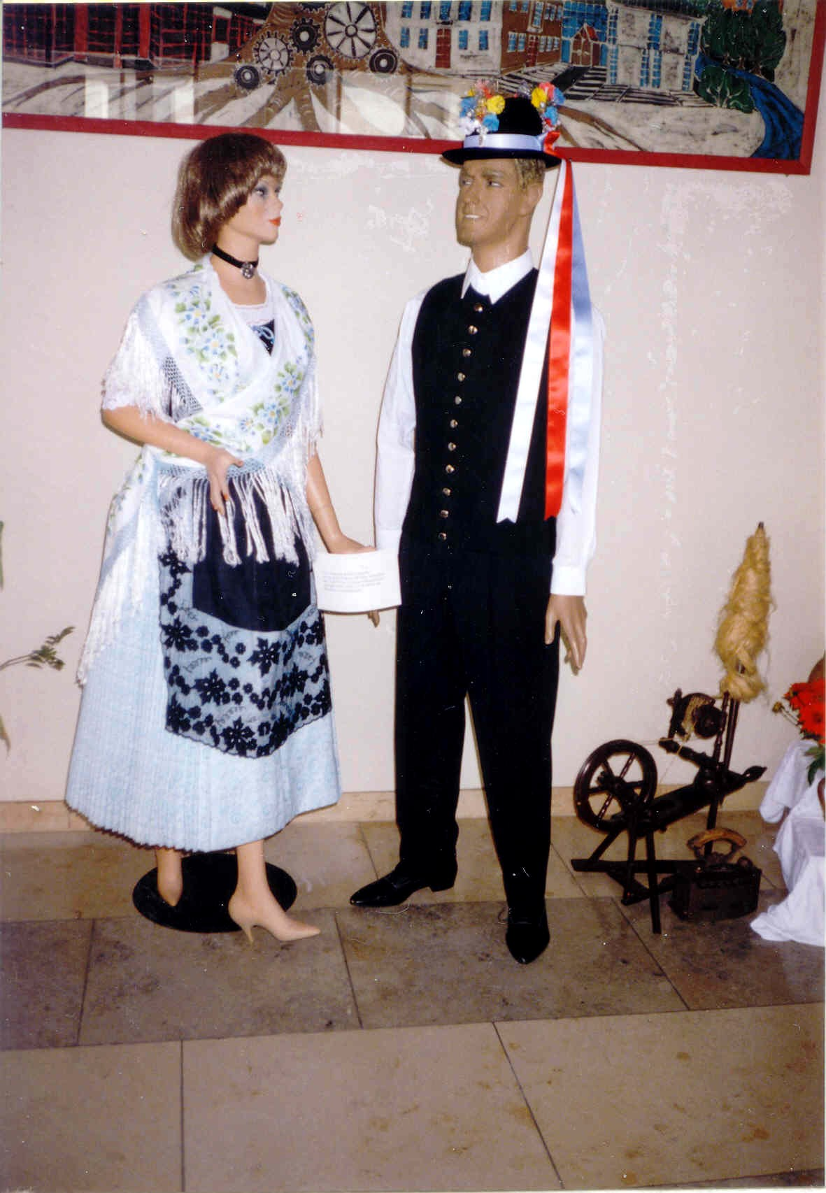 Dies ist die Eichenthaler Tracht (dargestellt an menschengroßen Puppen), so wie sie heute noch bei Trachtenumzügen und Heimattreffen der Eichenthaler in Asbach-Bäumenheim (nahe Augsburg und Donauwörth) getragen werden.